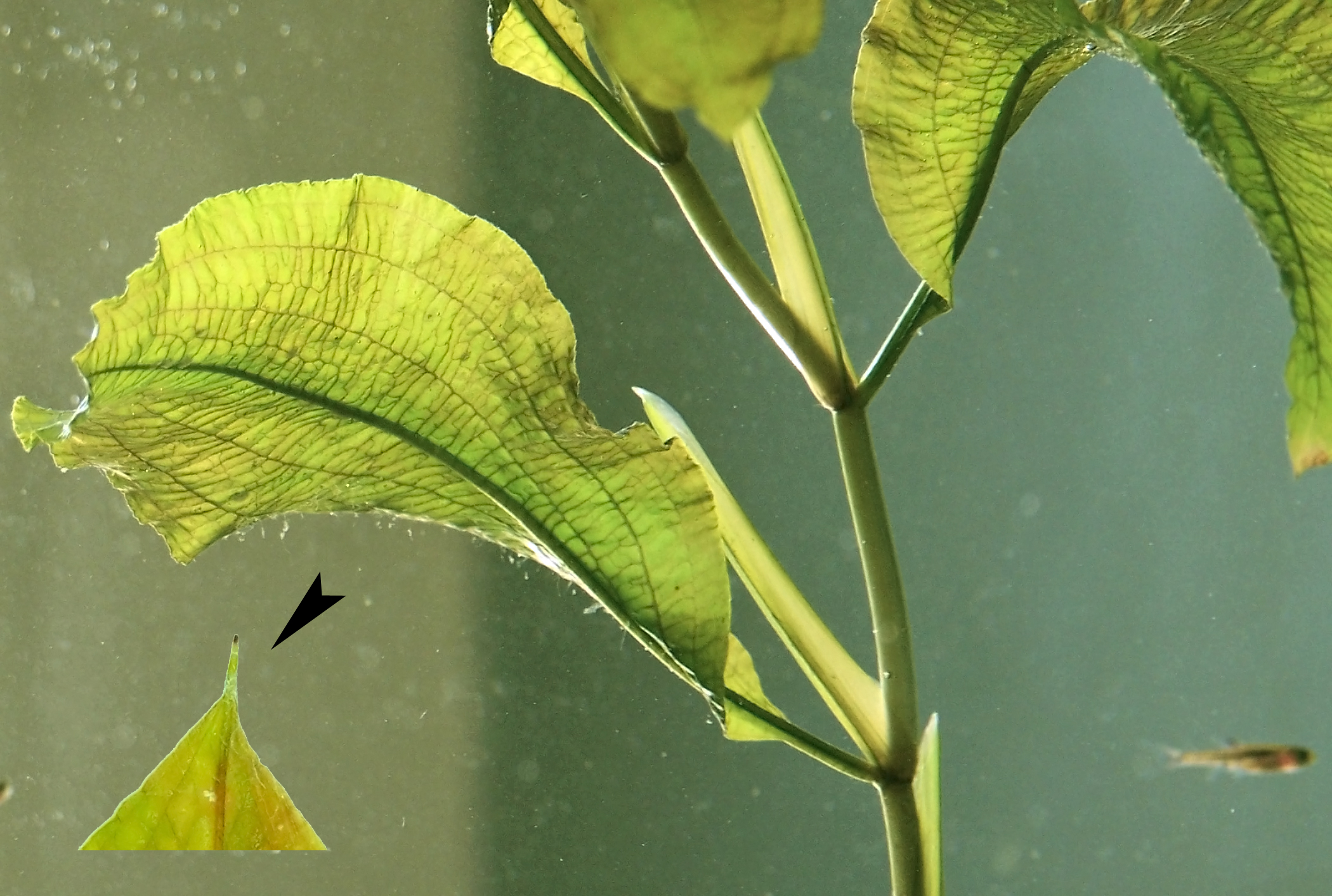 Potamogéton lucens L. Common En-name: Shining Pondweed Common German-name: Glänzendes Laichkraut, spiegelndes Samkrautgewächs. Description in